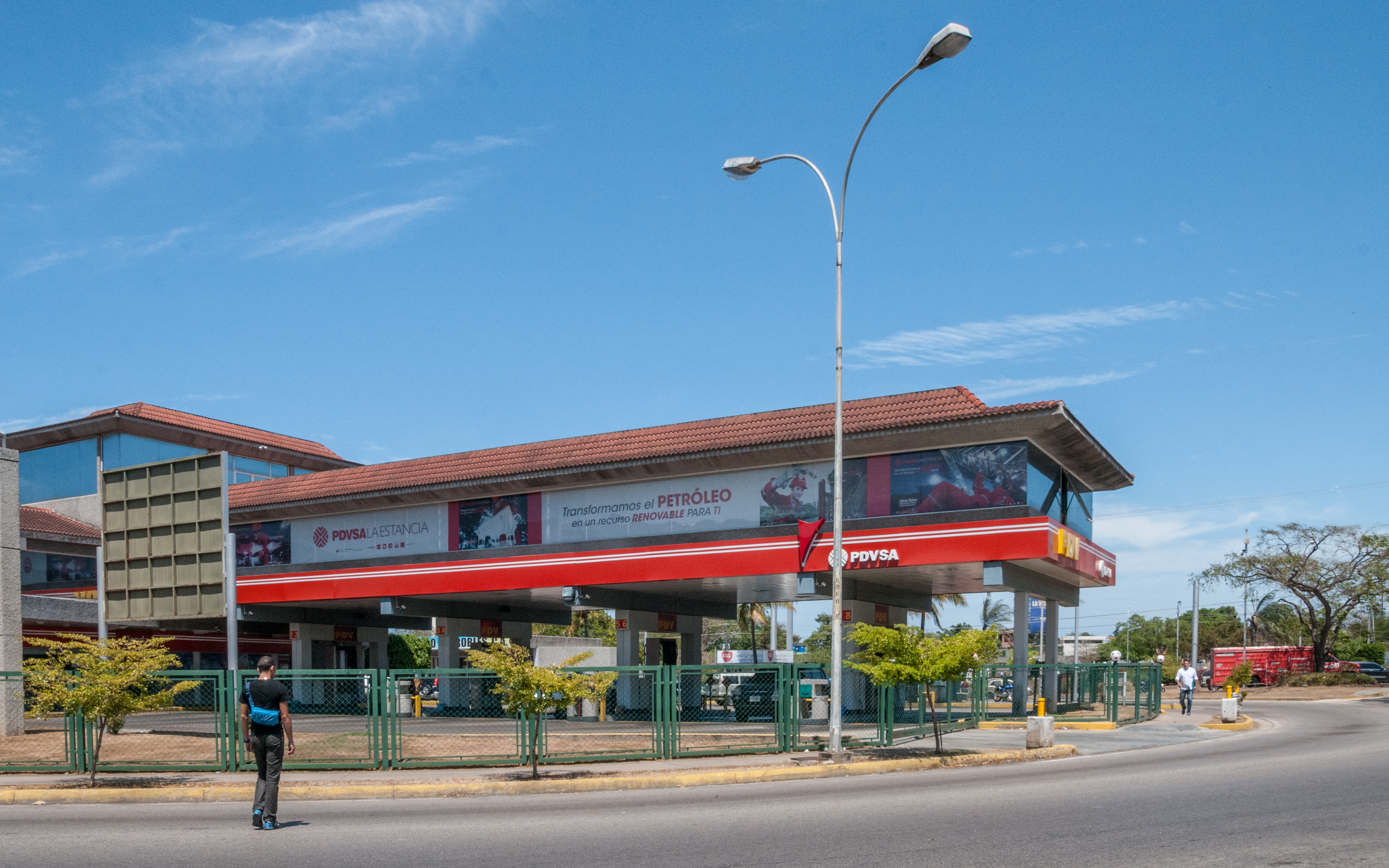 Bomba gasolinera de PDV en La Redoma de Los Robles